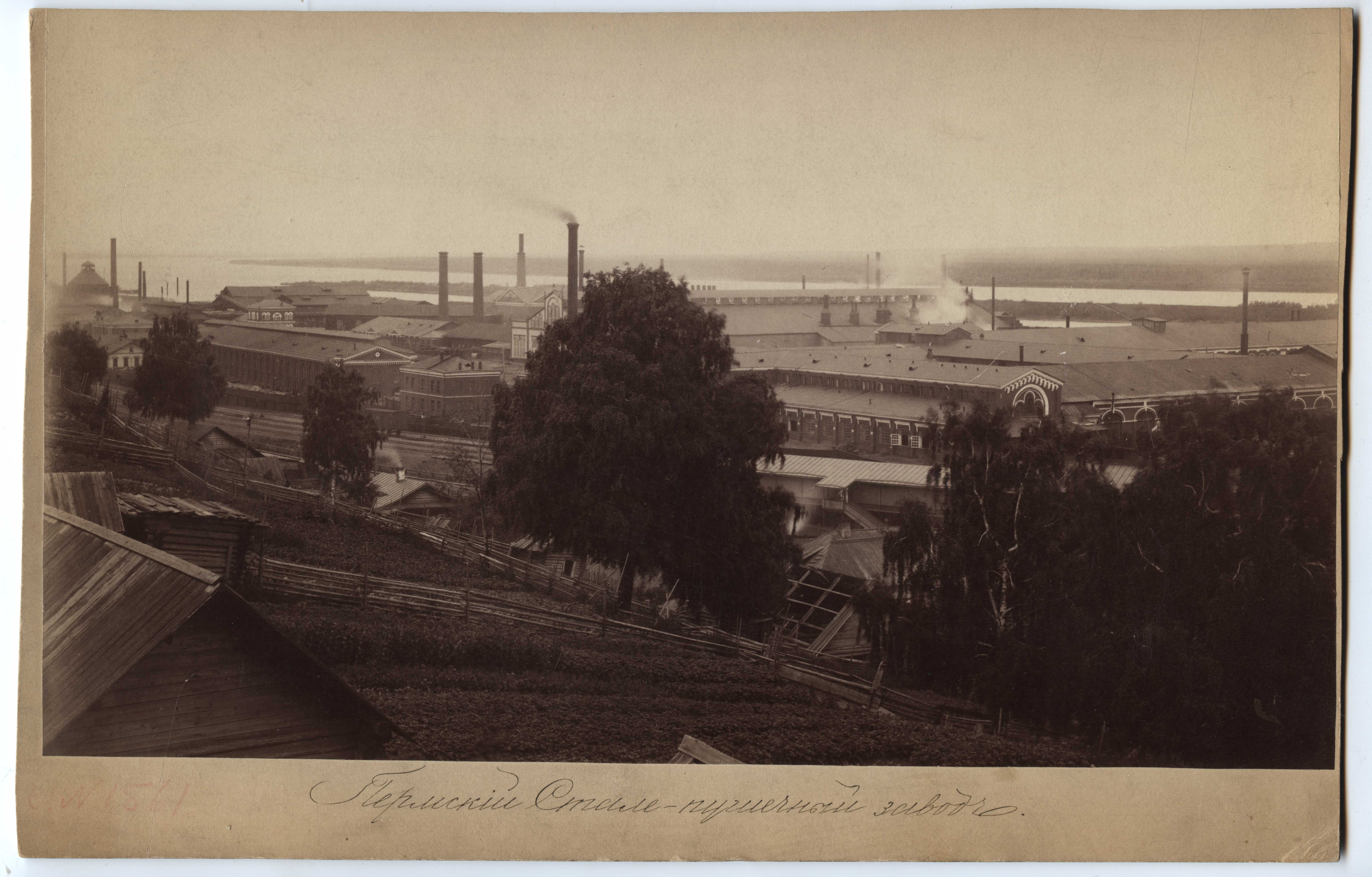 Панорама Мотовилихинского завода, вторая половина XIX вв. На фотографии справа видно здание 50-ти тонного молота. Из коллекции Музея истории ПАО "Мотовилихинские заводы"